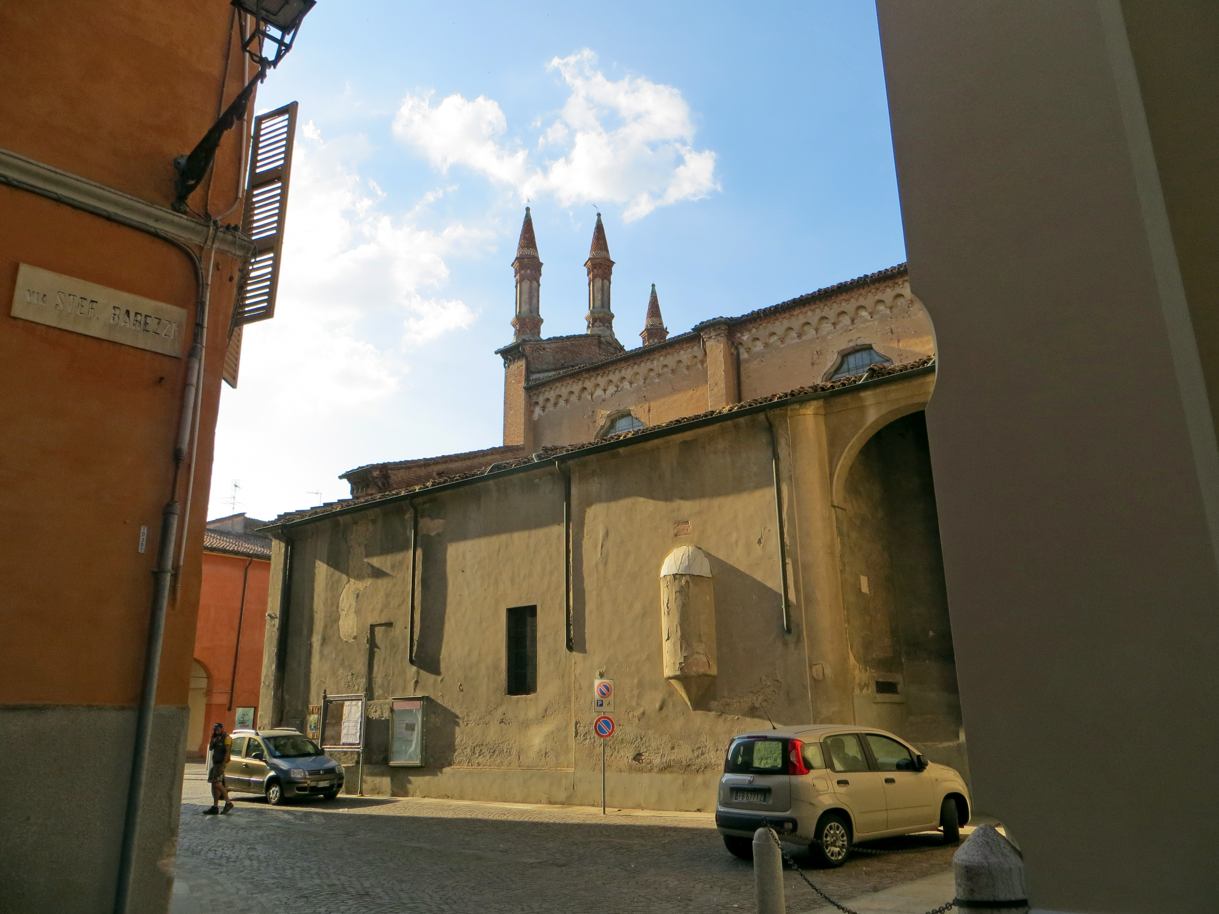 Collegiata di San Bartolomeo Apostolo (Busseto) - lato sud